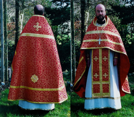 Prêtre orthodoxe russe à Am'dam. Les ornements liturgiques dans le rite byzantin